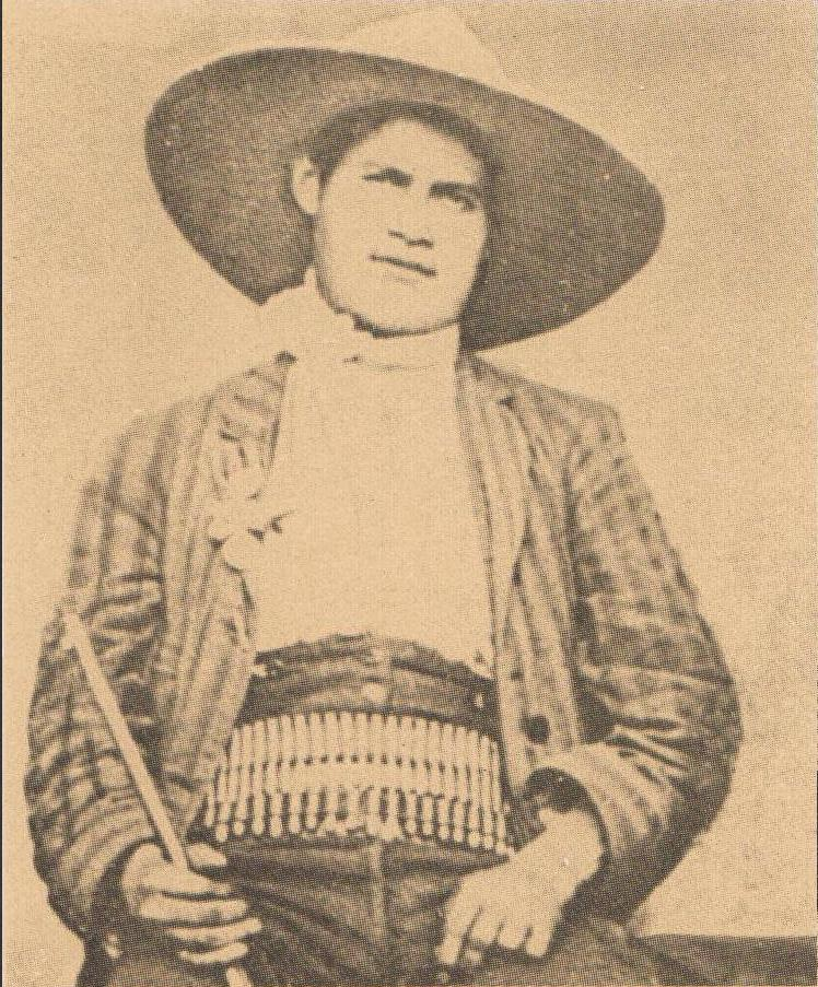 General Quintín González Nava